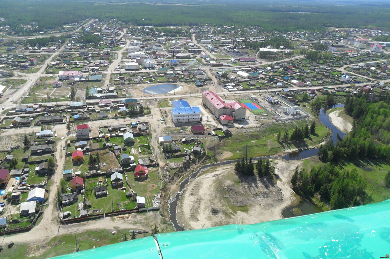 с. Бердигестях расположен на берегу реки Маатта